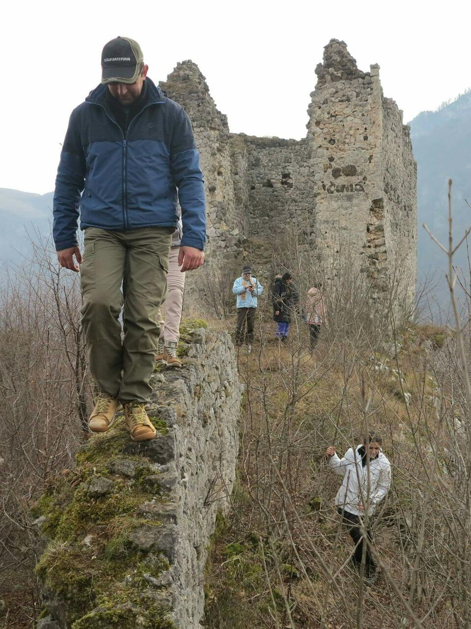 Тврђава је подигнута на неприступачном терену у селу Клотјевац, у општини Сребреница. Град је припадао српској племићкој породици Павловић и Дињичићима. Представљао је један од њихових граничних градова.